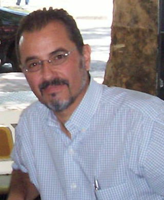 Foto de Raul Silanes en Mendoza. Argentina en 2009